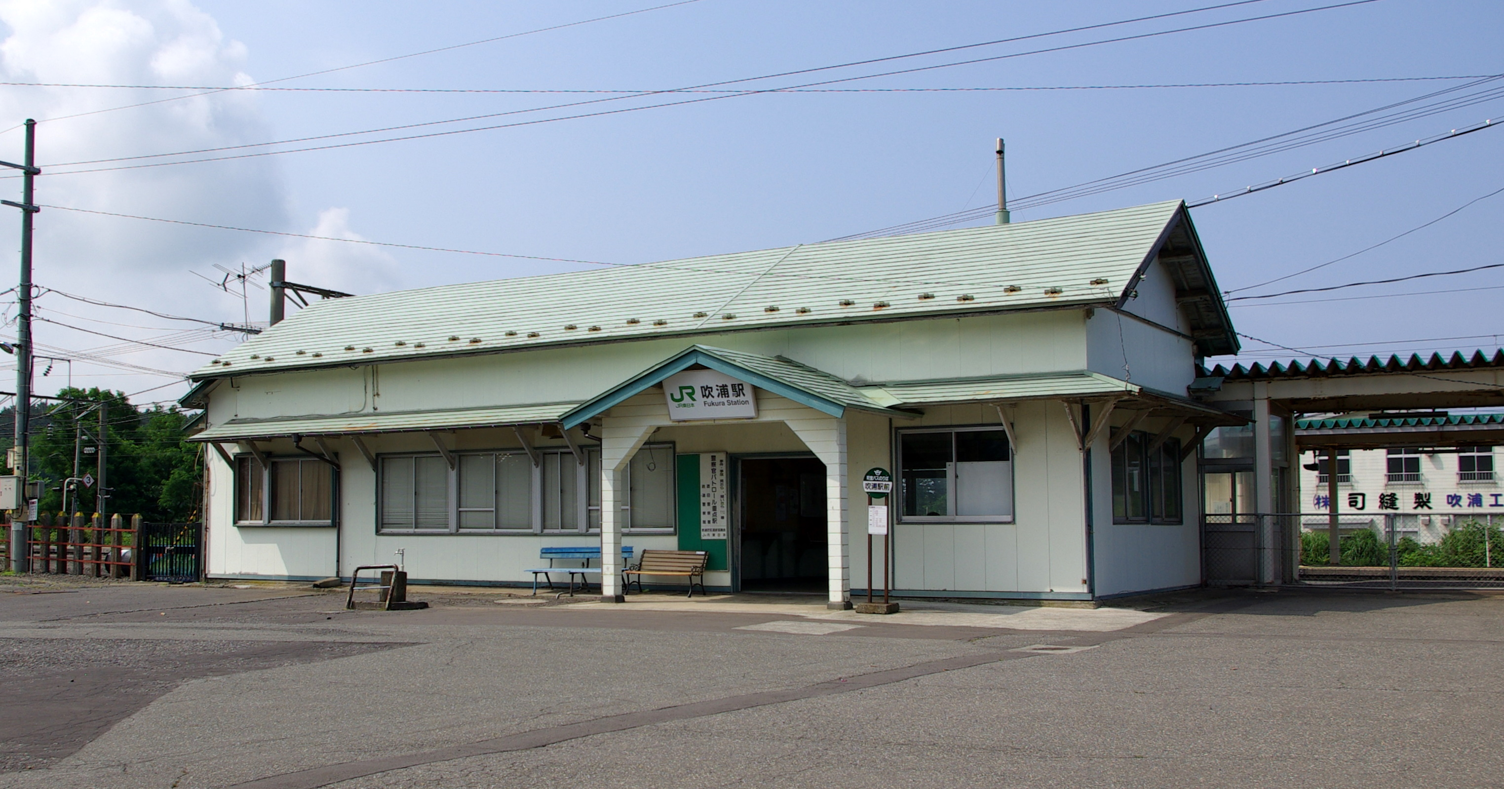 東日本旅客鉄道羽越本線吹浦駅駅舎画像